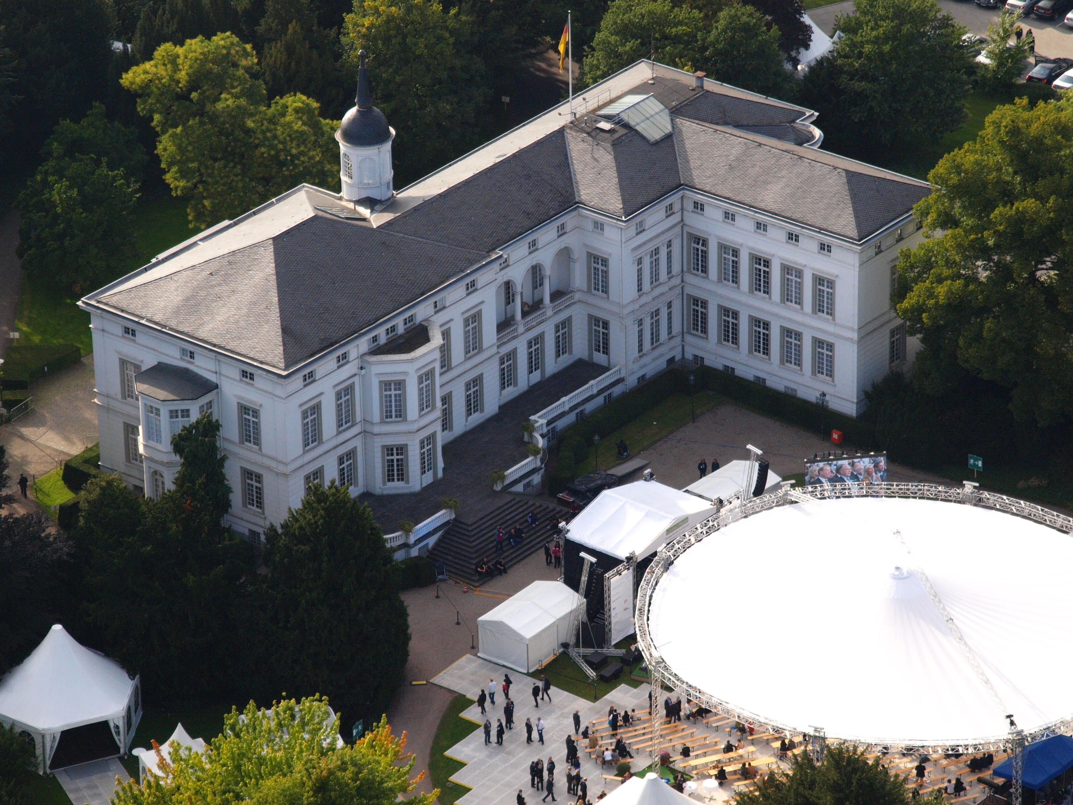 Palais Schaumburg, Bonn: Luftaufnahme